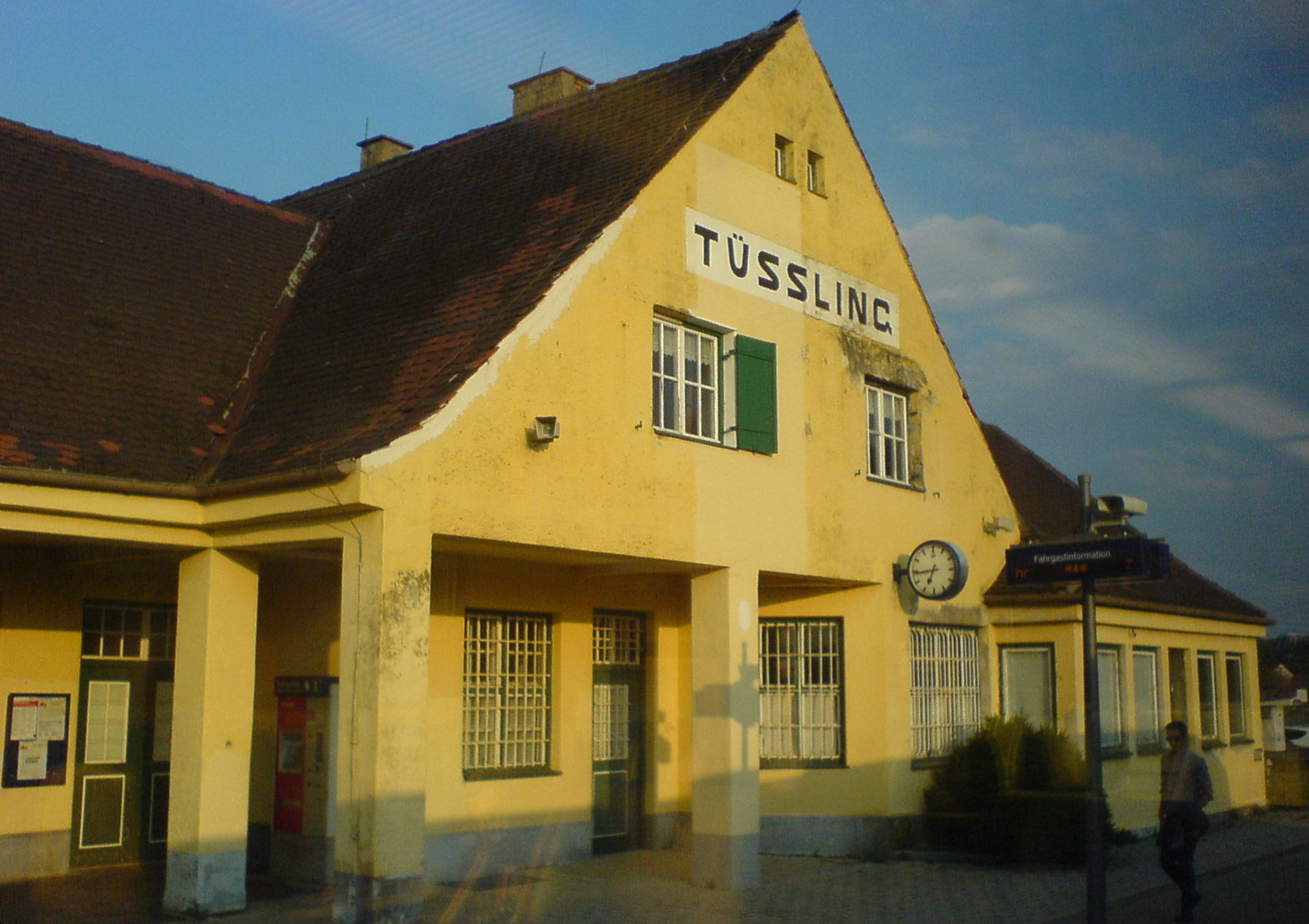 Markt Tüßling, Landkreis Altötting, Oberbayern, Am Bahnhof 2